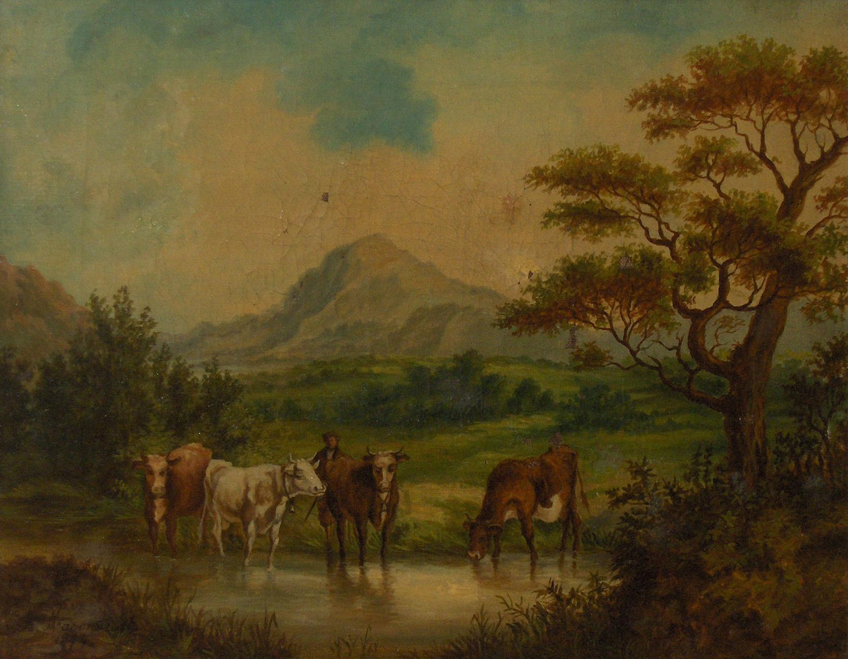 "De drinkplaats", olieverf op doek (1874) door de Oostendse schilder Alphonse Maeroudt (1850 - ?)